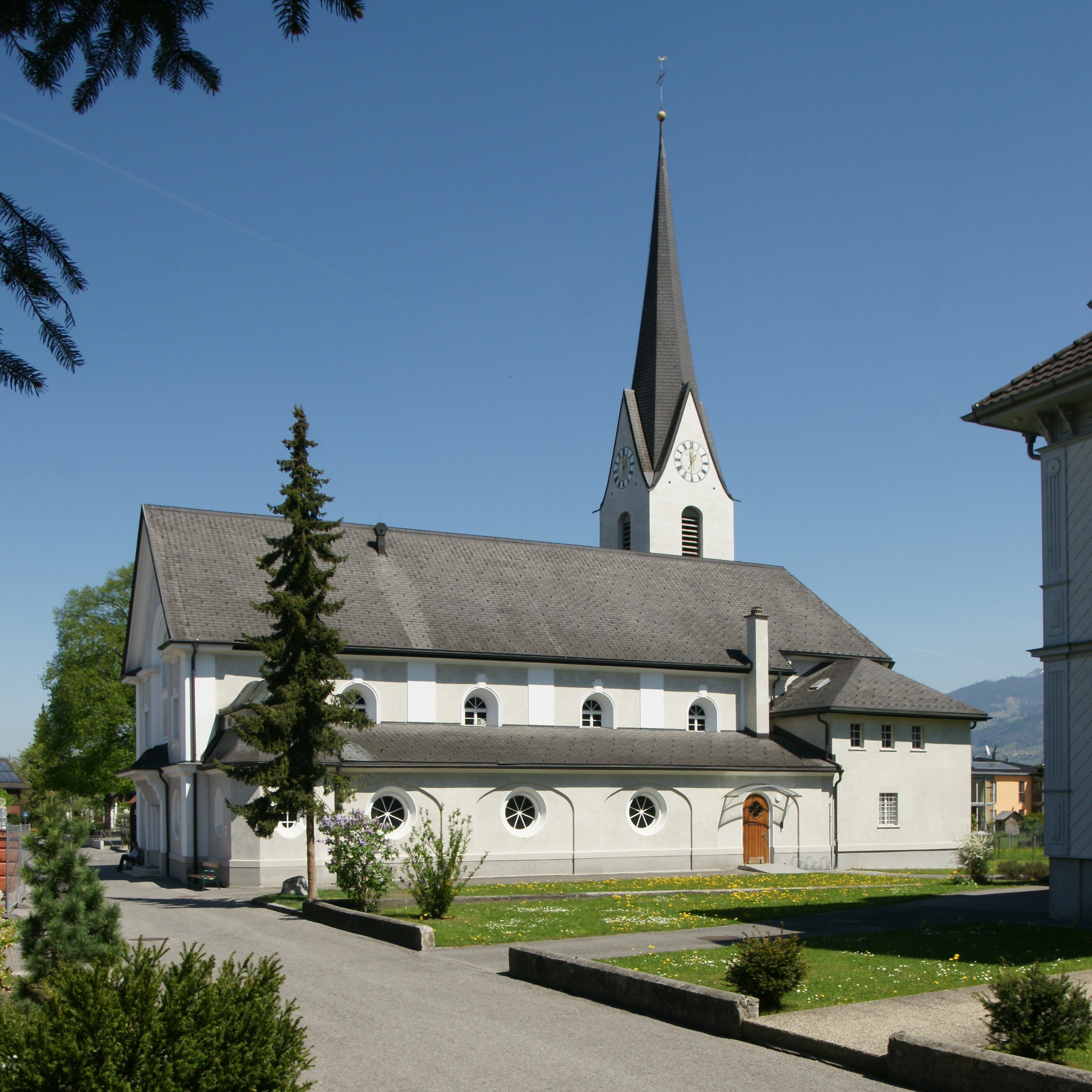 Stadtpfarrkirche "hl. Sebastian" in Gisingen in Feldkirch.1922 erweitert im Langhaus und Anbau von zwei Seitenschiffe durch Willibald Braun.